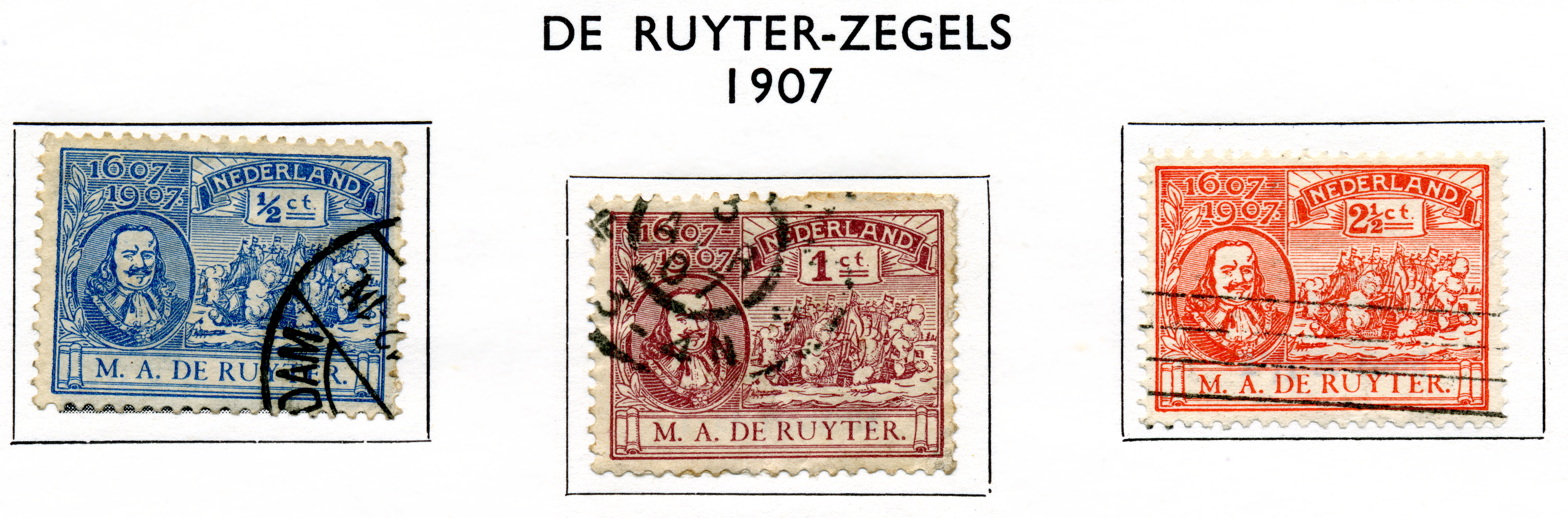 De Ruyter zegels (1907)(NVPH 87-89). Ontwerper W.A. Mouton